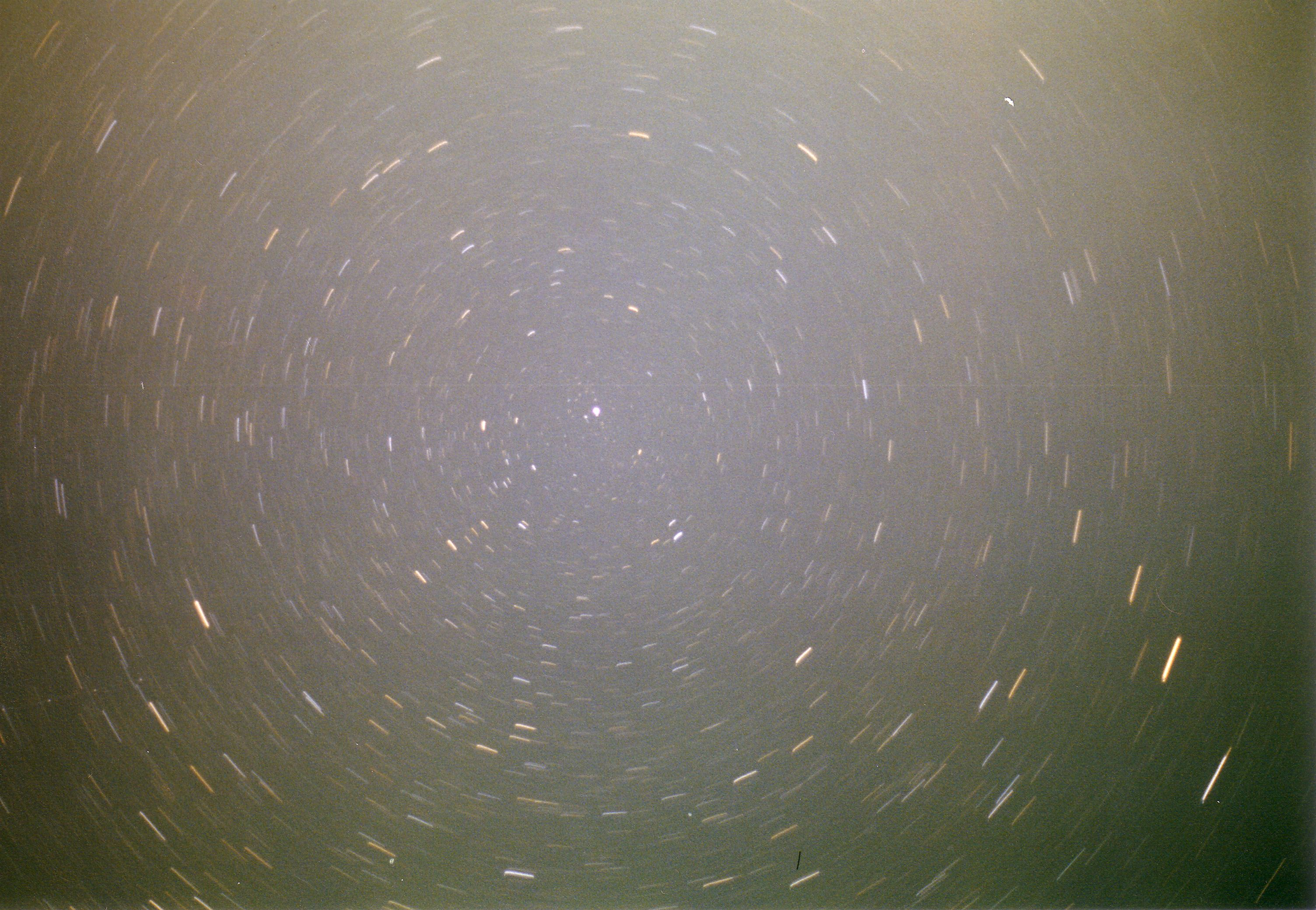 Circumpolar stars